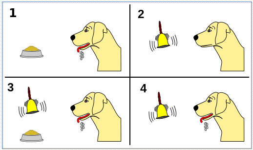 การวางเงื่อนไขเงื่อนไขแบบดั้งเดิมกับสุนัขด้วยวิธีการของพาร์พลอฟ